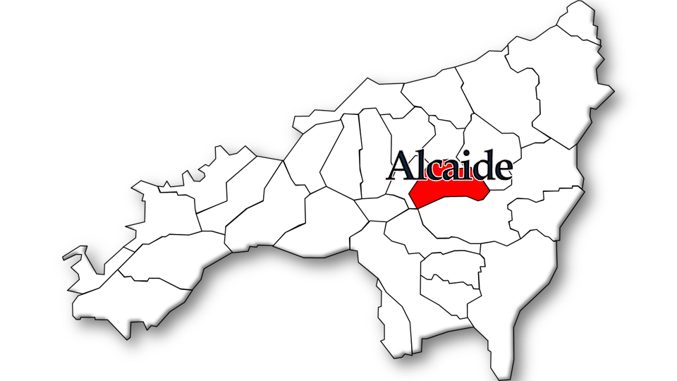 População